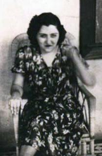 عصمت دولت شاهی Esmat Dowlatshahi